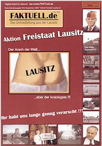 2000 - Einzige Printausgabe von FAKTuell.